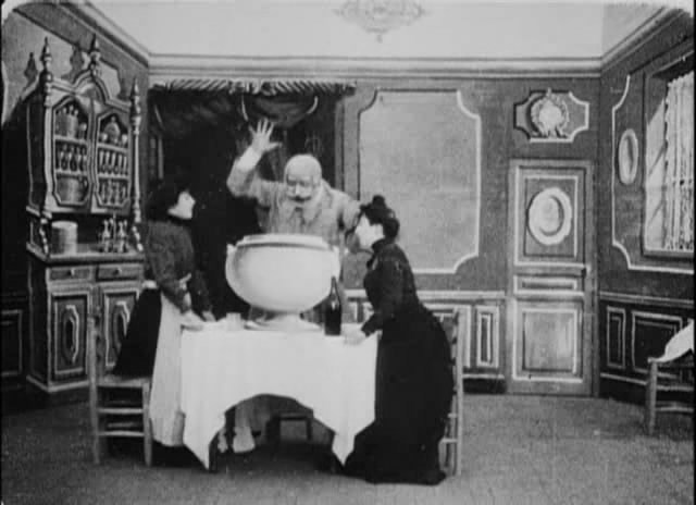 Photo du film "Le Repas fantastique" (1900) de Georges Méliès